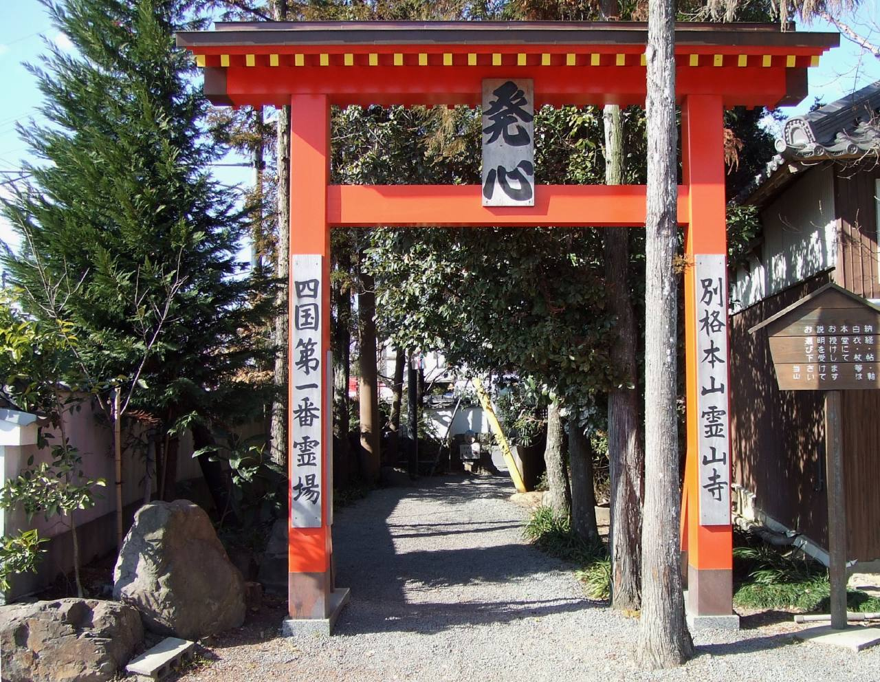 霊山寺の発心の門